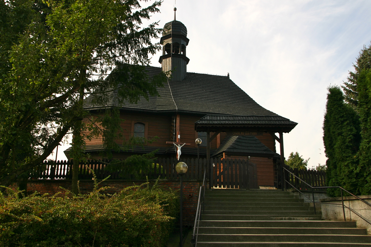 Rzepcze (dodatkowa nazwa w j. niem. Repsch) – wieś w Polsce położona w województwie opolskim, w w powiecie prudnickim, w gminie Głogówek.